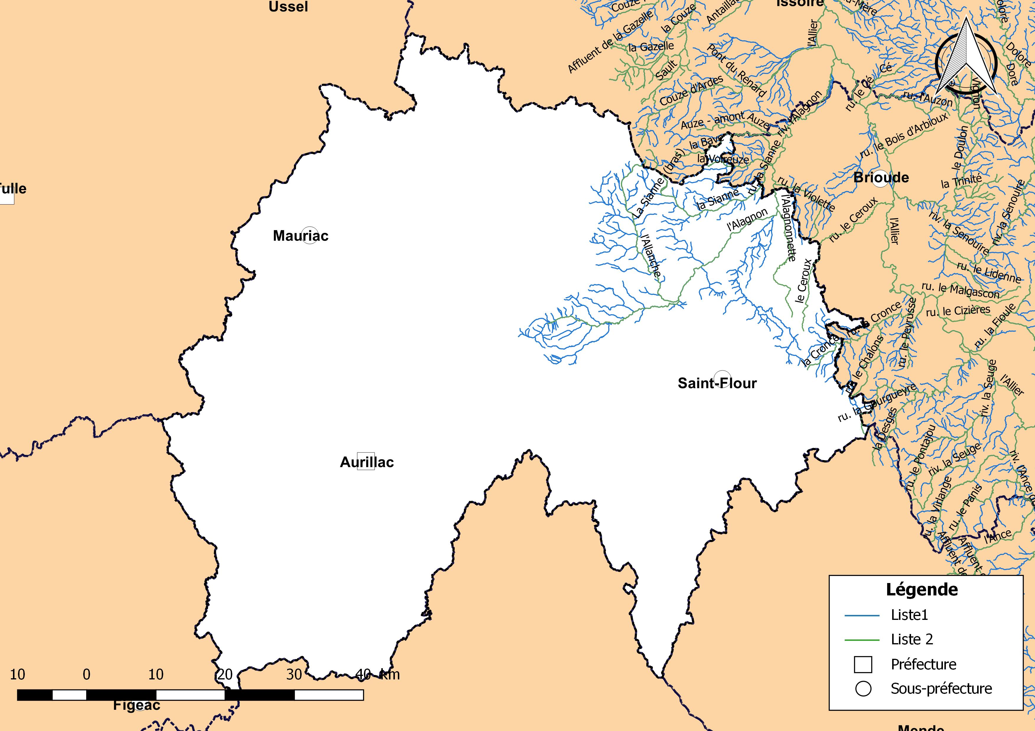 Classement des cours d'eau du département du Cantal (France) au titre de la continuité écologique (article L214.17 I du Code de l'environnement).